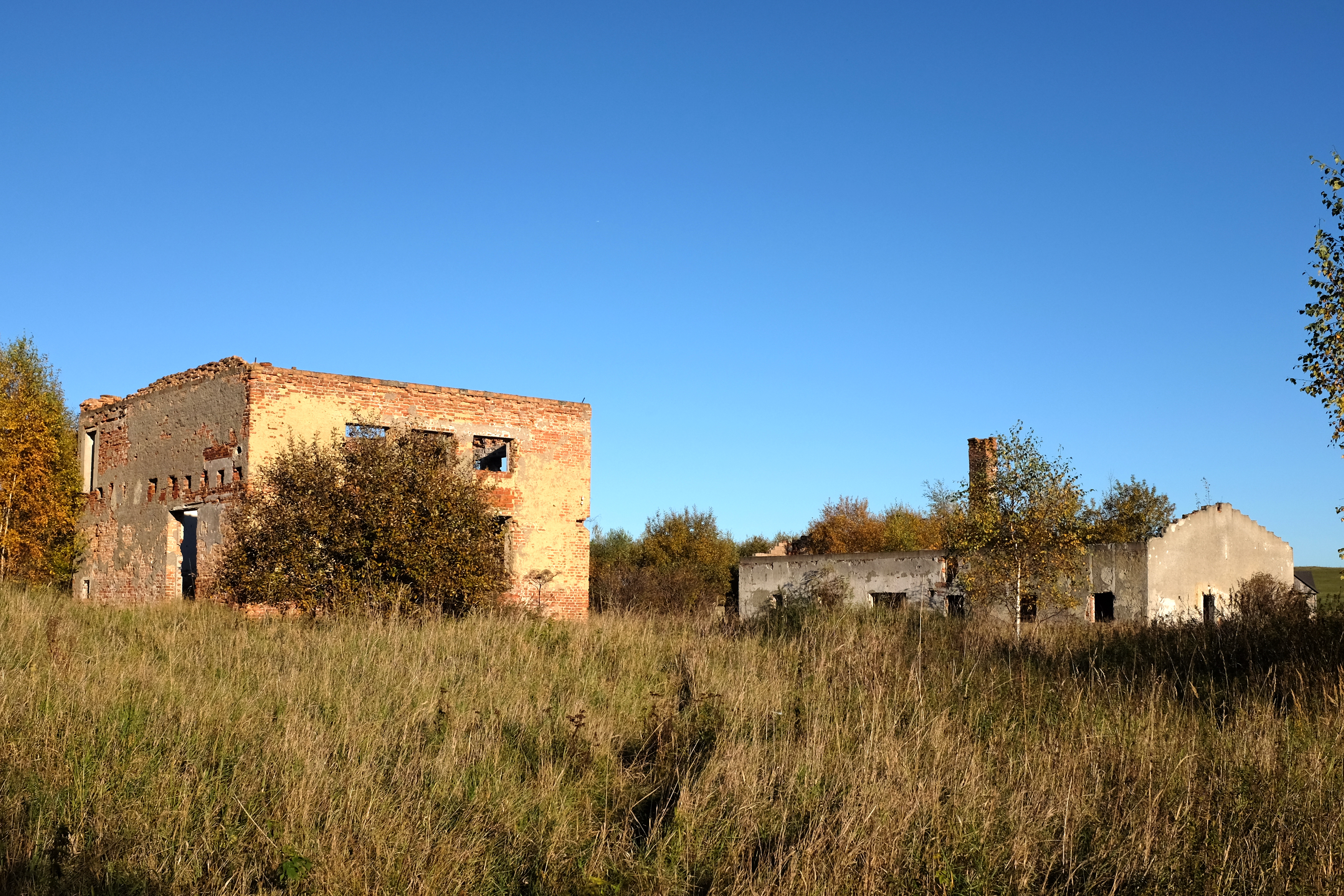 Bývalý uranový důl Svatopluk, Horní Slavkov